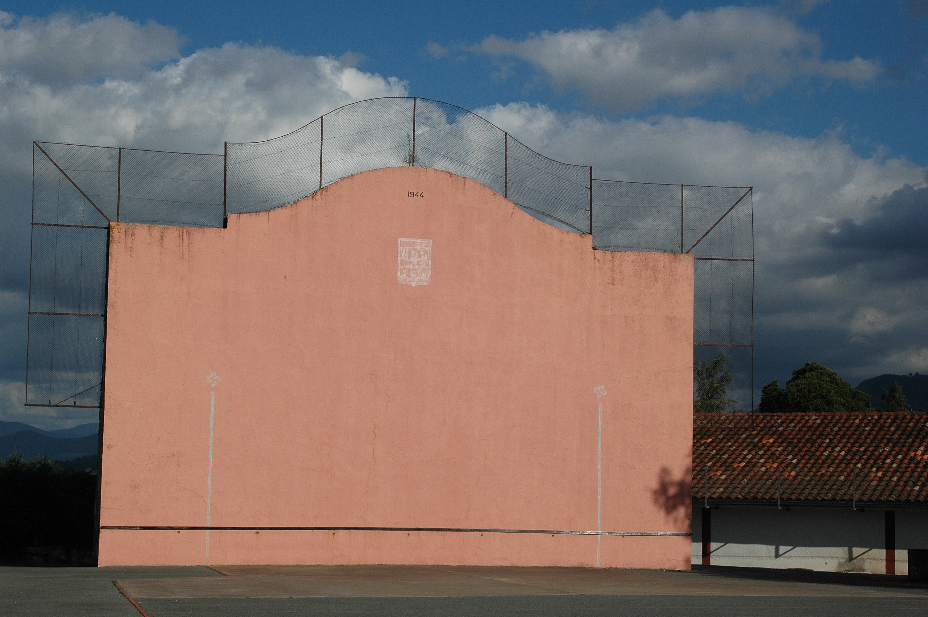 Irouléguy, le fronton. Photo prise le 03/08/06 par Harrieta171